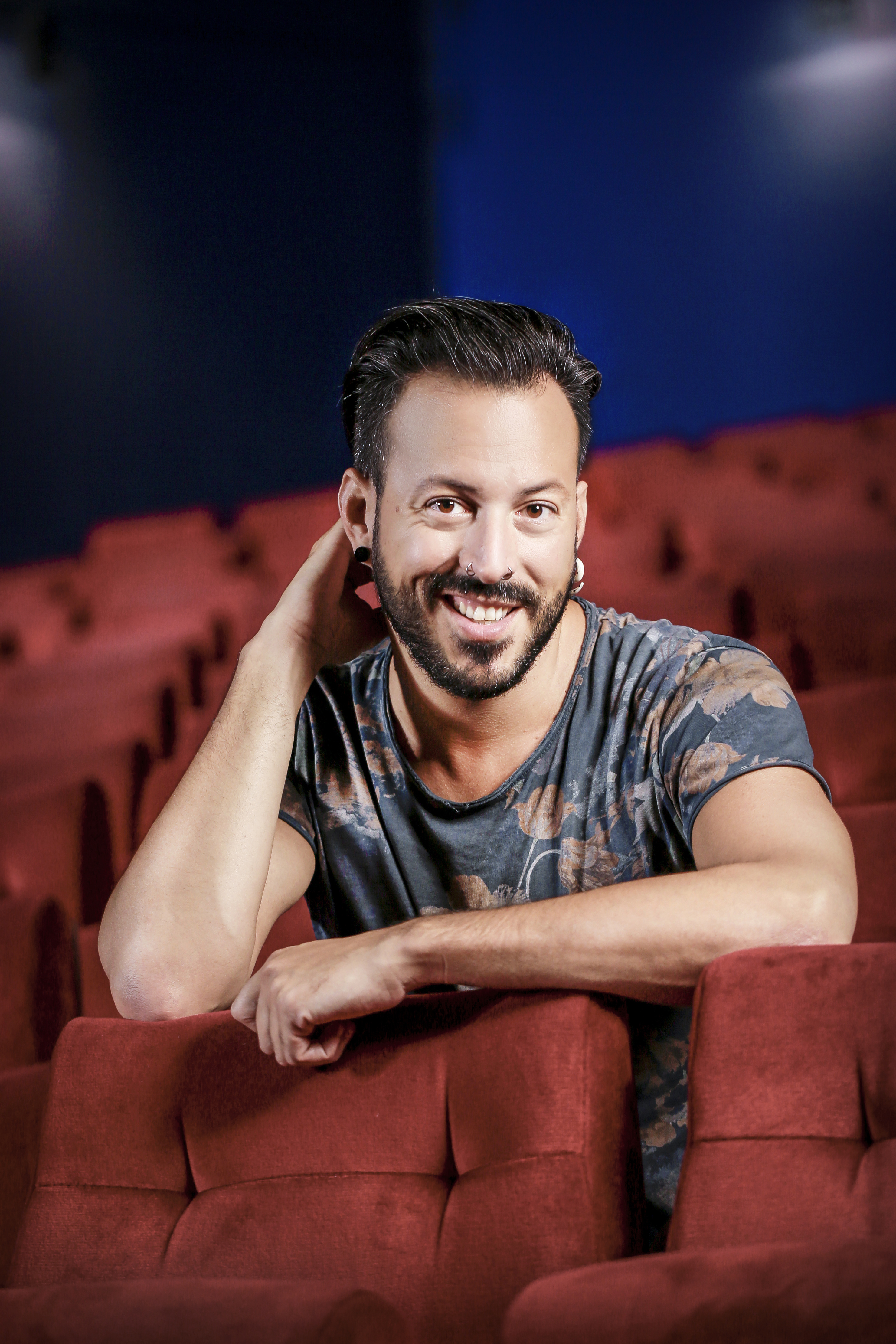 Regisseur Jakob M. Erwa Foto: onloph, Simon Möstl